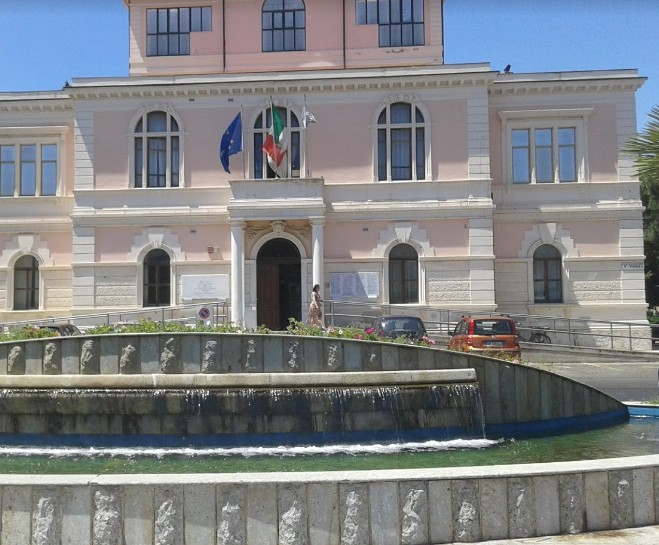 Siderno - Palazzo Municipale - Dettaglio